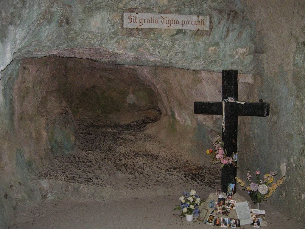 Eremo di Sant'Onofrio al Morrone Foto personale concessa in PD